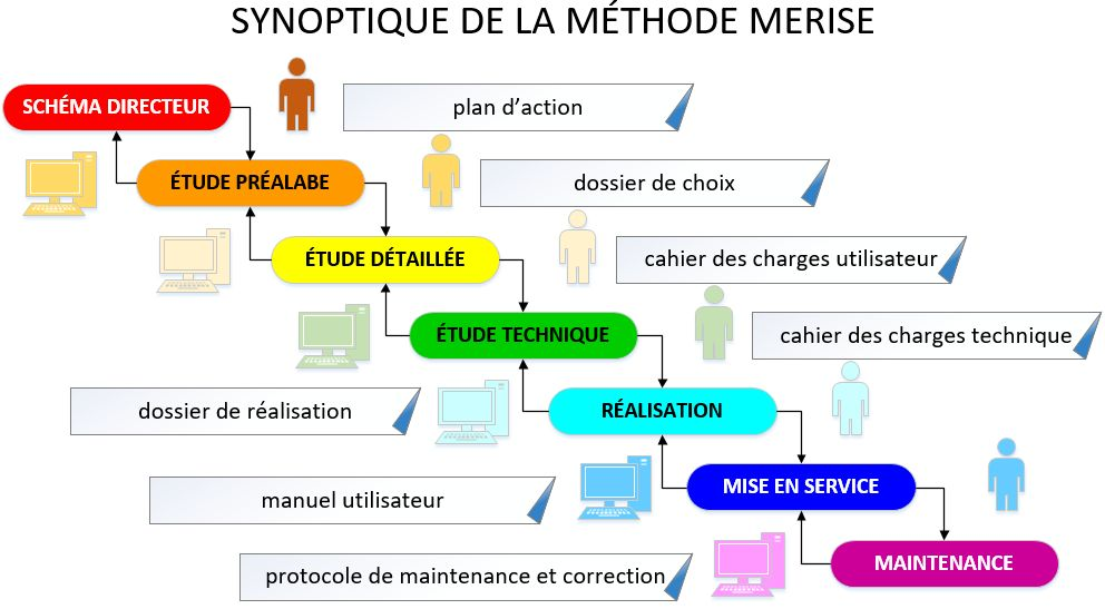 Articulation des différentes étapes de réalisation de la méthode MERISE 2 pour l'organisation, l'étude, la conception, la réalisation et la maintenance des systèmes informatiques